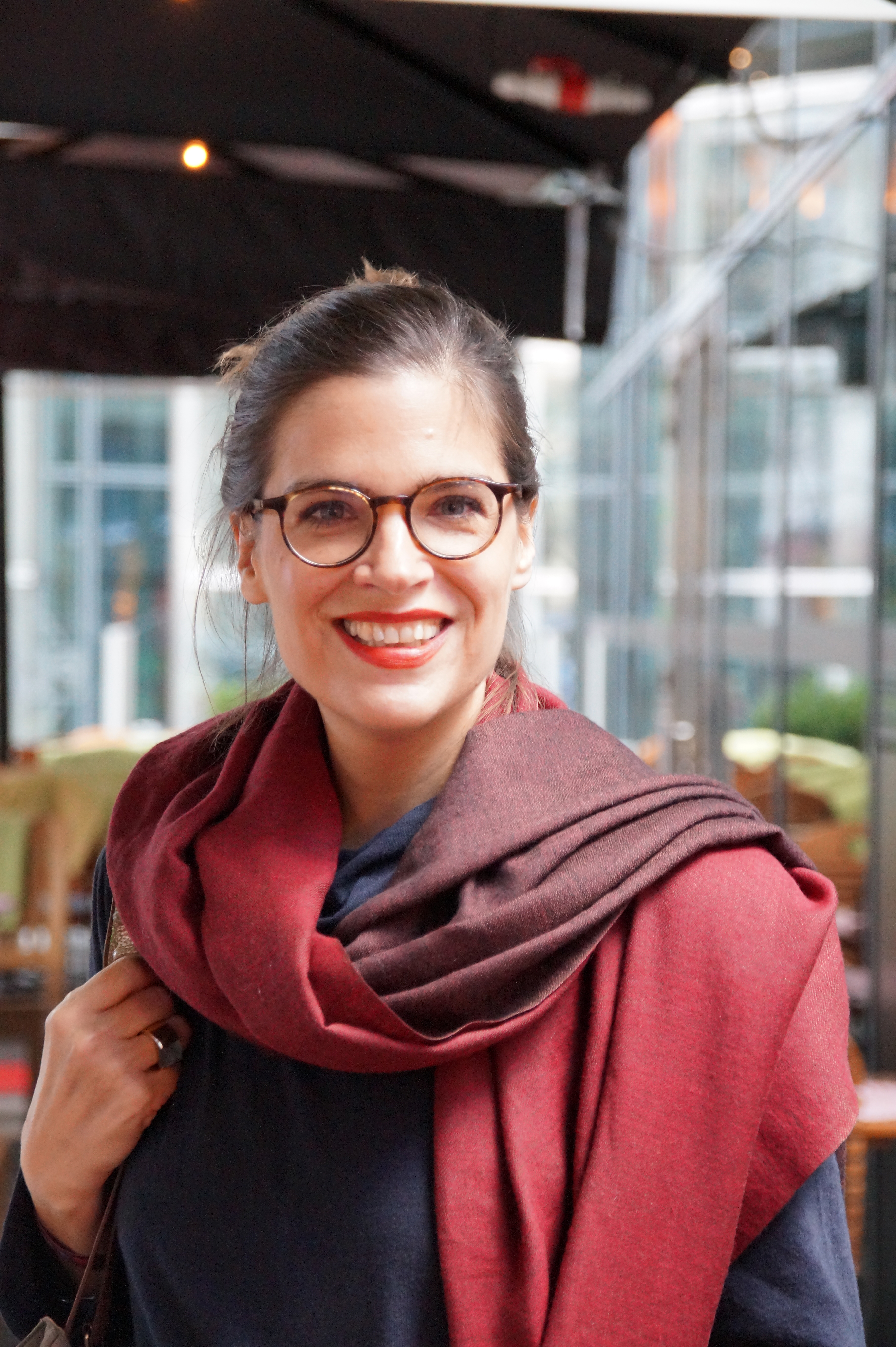 Judith Doeker bei der Verleihung des Kurzfilmpreises "Blaue Blume", am 10.02.2016, im Sony Center Berlin.